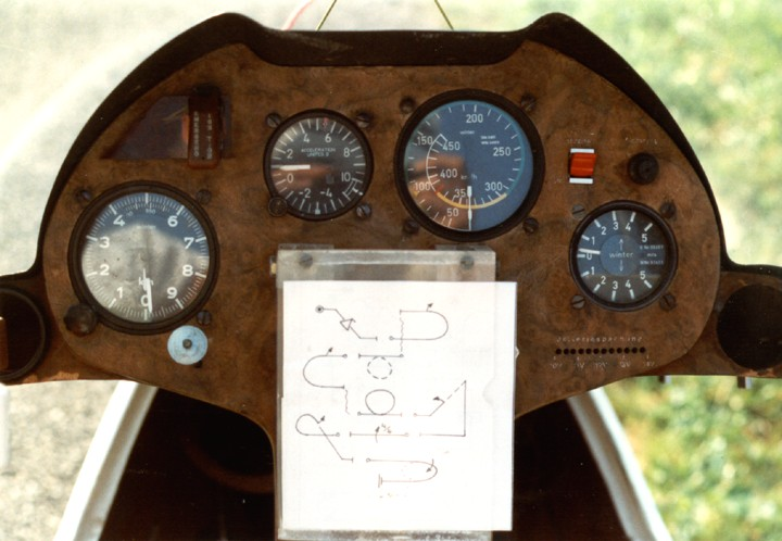 Das Cockpit der Akaflieg München Mü 28.